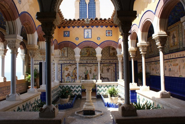 Claustre del Palau Maricel de Sitges. Construït pel nordamericà Charles Deering a principis del segle XX